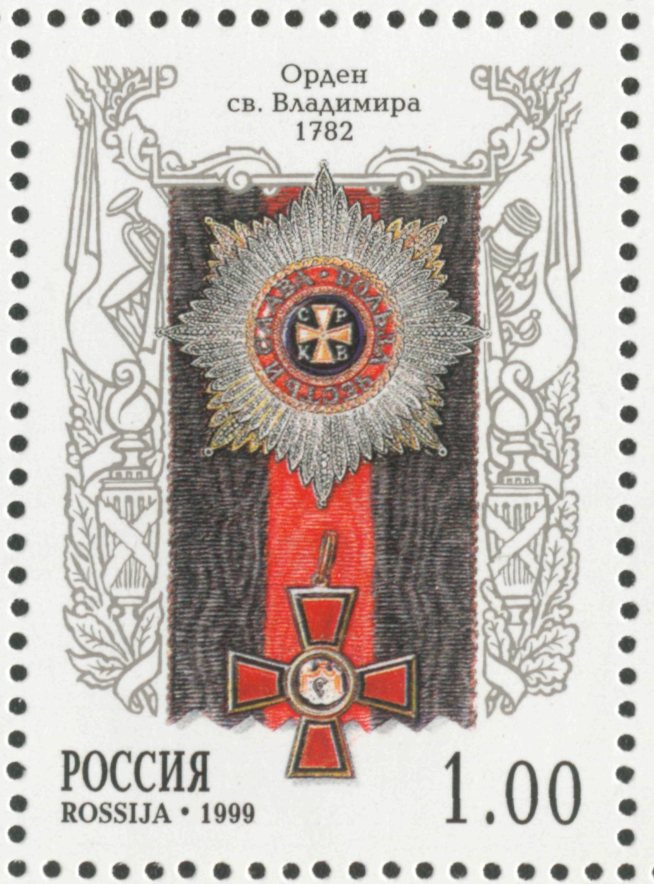 Ордена Российской Империи. Орден святого Владимира. Из малого марочного листа России из пяти марок 1999 года.